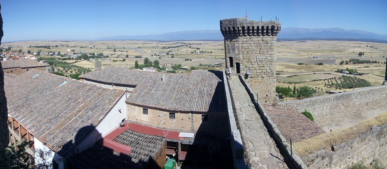 Vista norte desde el Castillo de Oropesa. Provincia de Toledo (España)